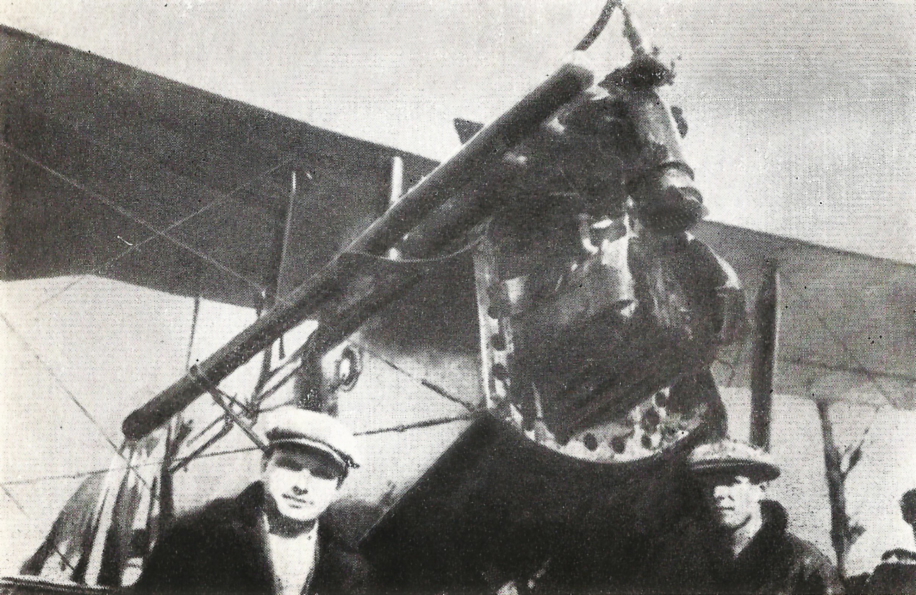 Slavorossov and Vodopianov, 1920